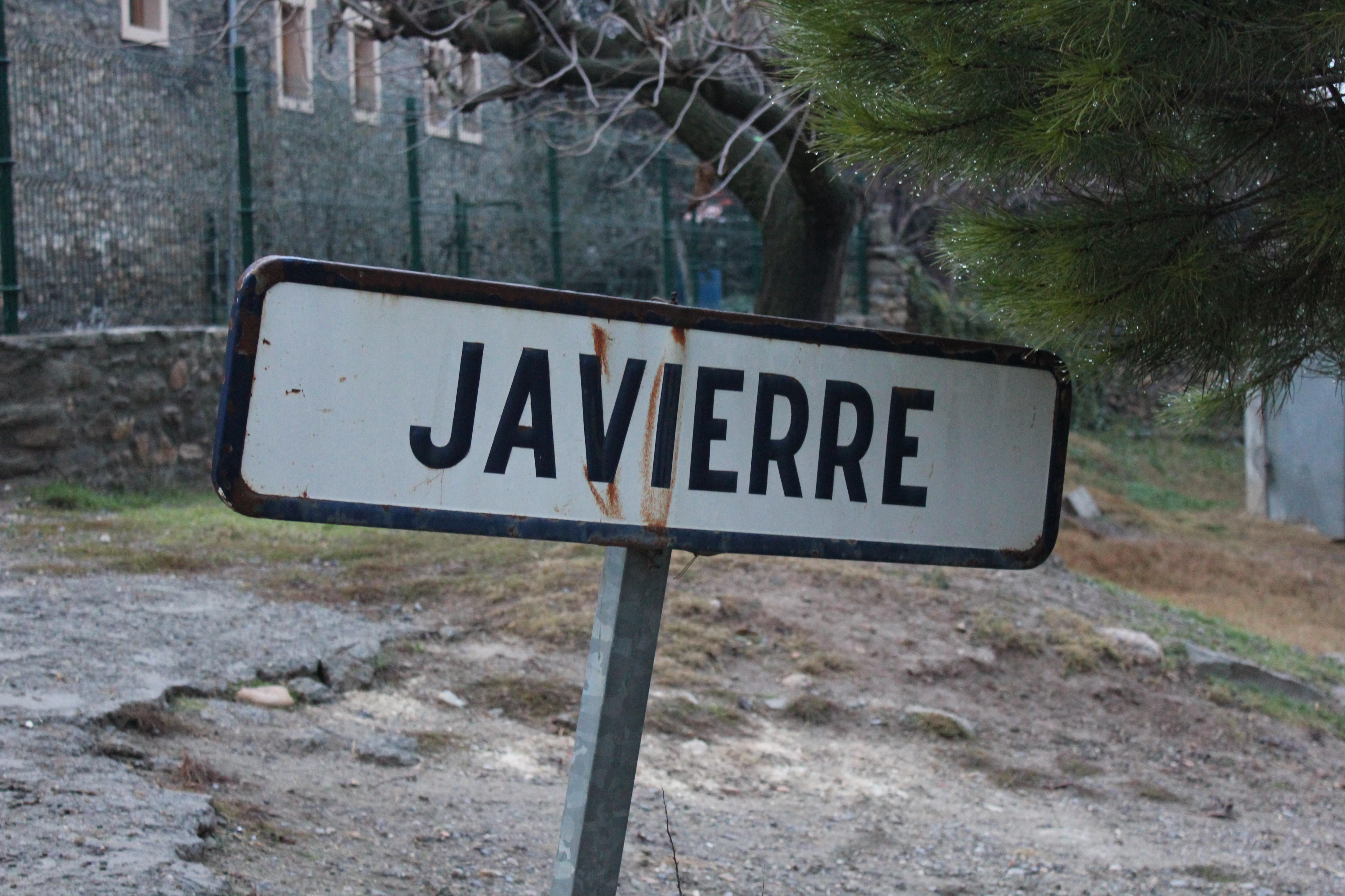 Aragonés: cartel de carretera en a dentrada de Chabierre d'o Elsón.